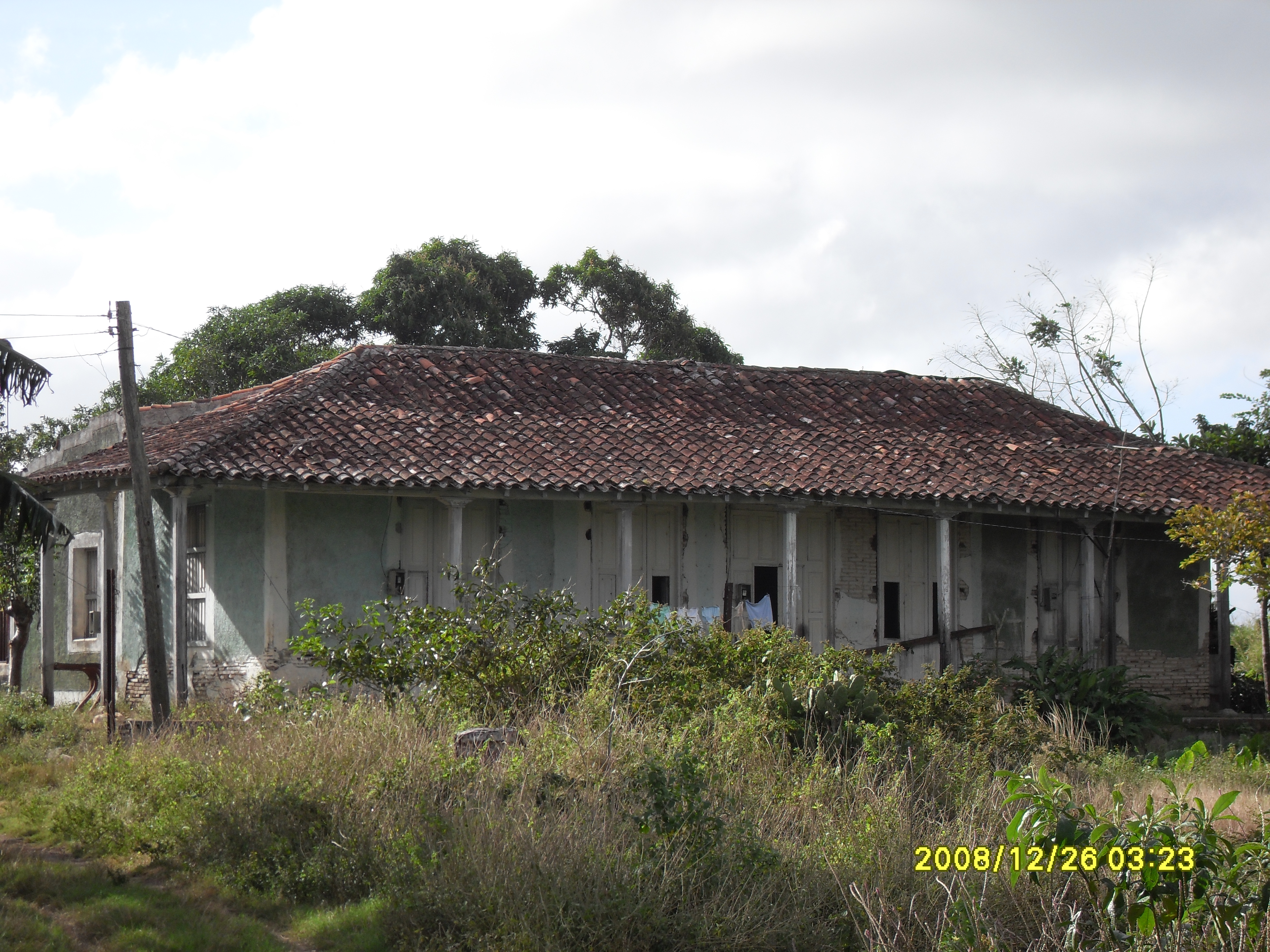 Casa donde vivio Marta Abreu en Encrucijada Villa Clara en la finca de sus padres